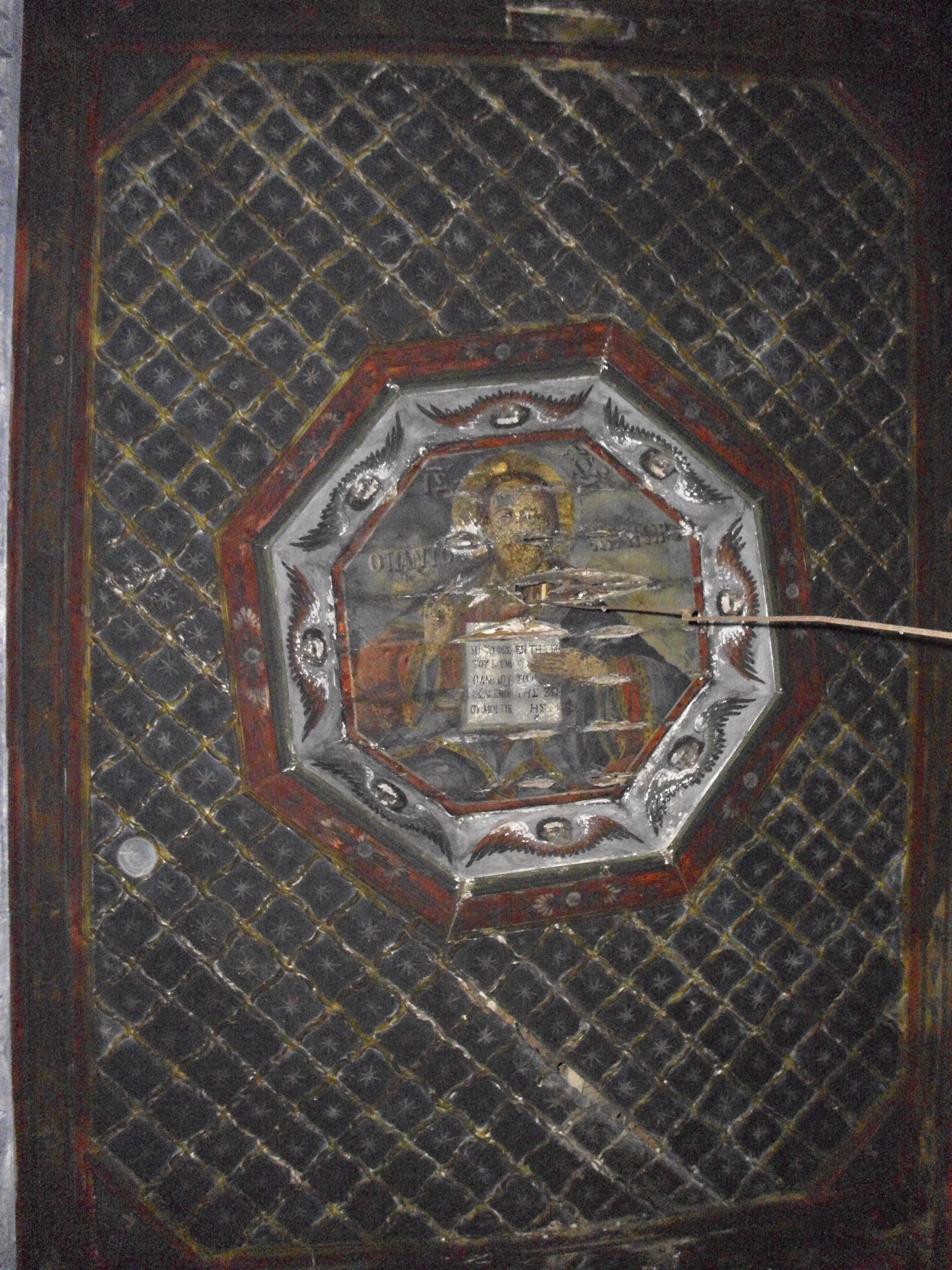 Църквата "Свети Николай" в село Корнишор, днес Република Гърция.